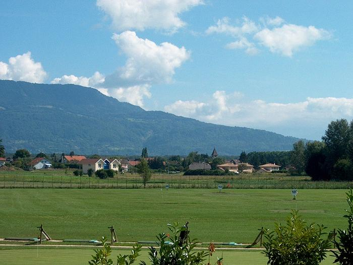 Veigy-Foncenex et les Voirons vus depuis Crevy et la Suisse